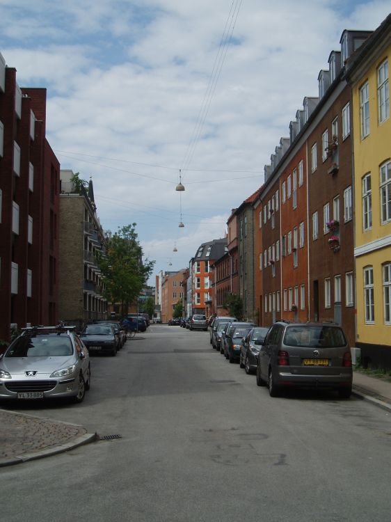 Sofiegade på Christianshavn